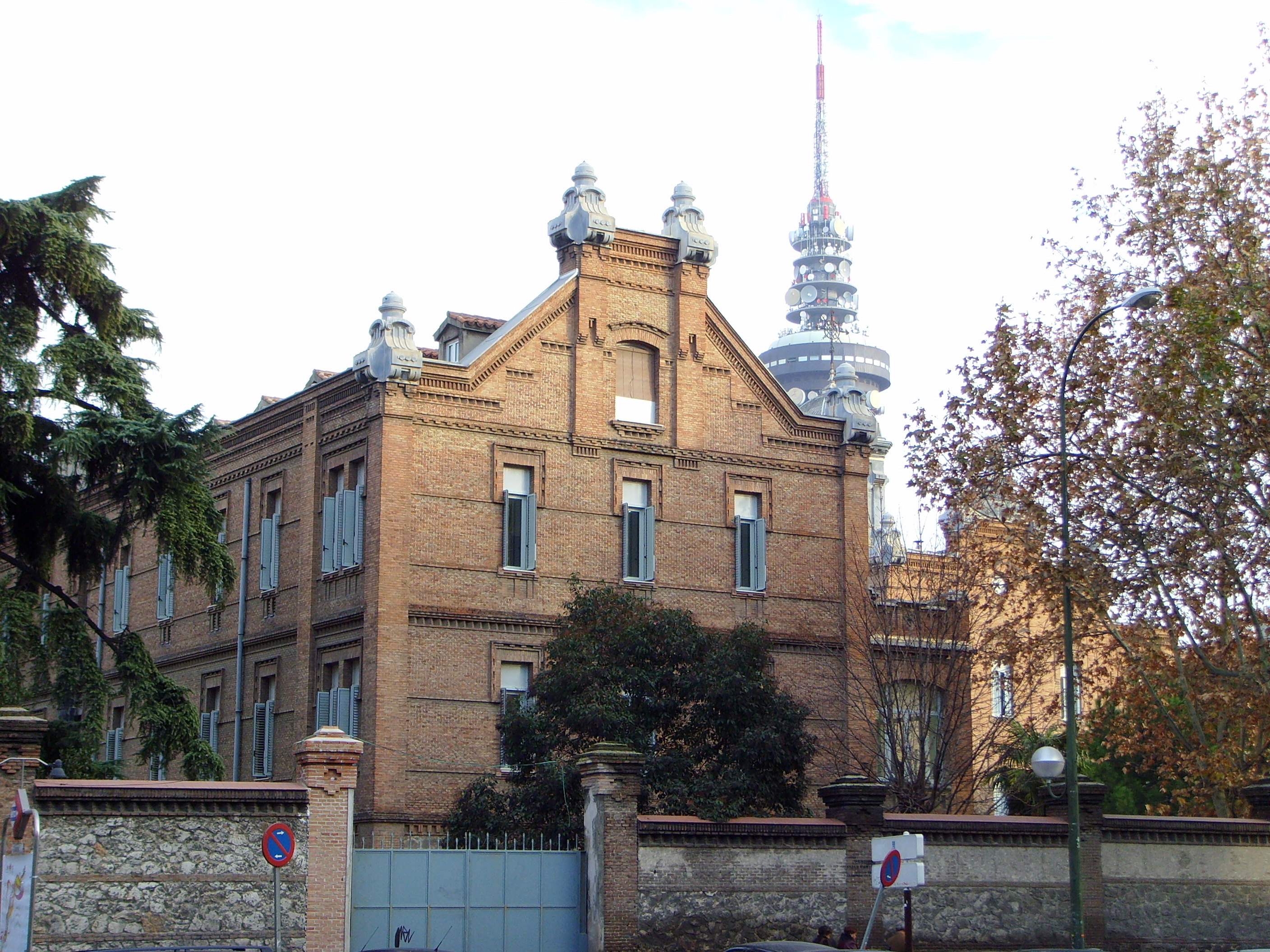 Neo-Mudéjar building in Madrid. In the background, Torrespaña. Neomudéjar madrileño. Al fondo, Torrespaña. Asilo de las Hermanitas de los Pobres. Dirección: c/ Dr. Esquerdo, 49. Construcción: principios del s. XX (antes de 1910).